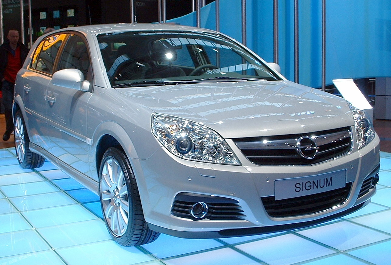 Opel Signum Facelift 2005